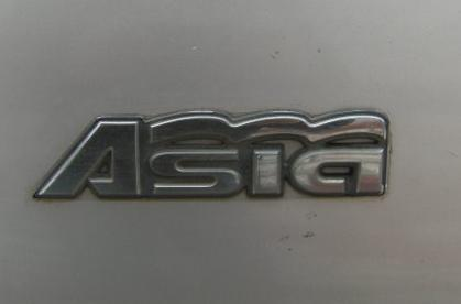 Asia Motors amblemi